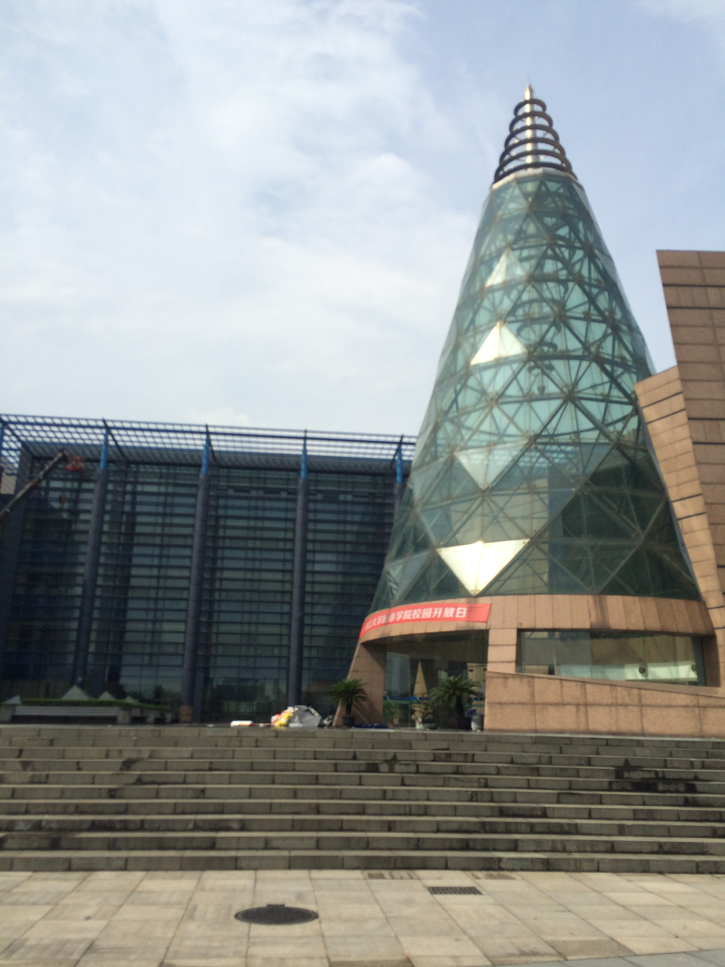 浙江大学城市学院图信中心